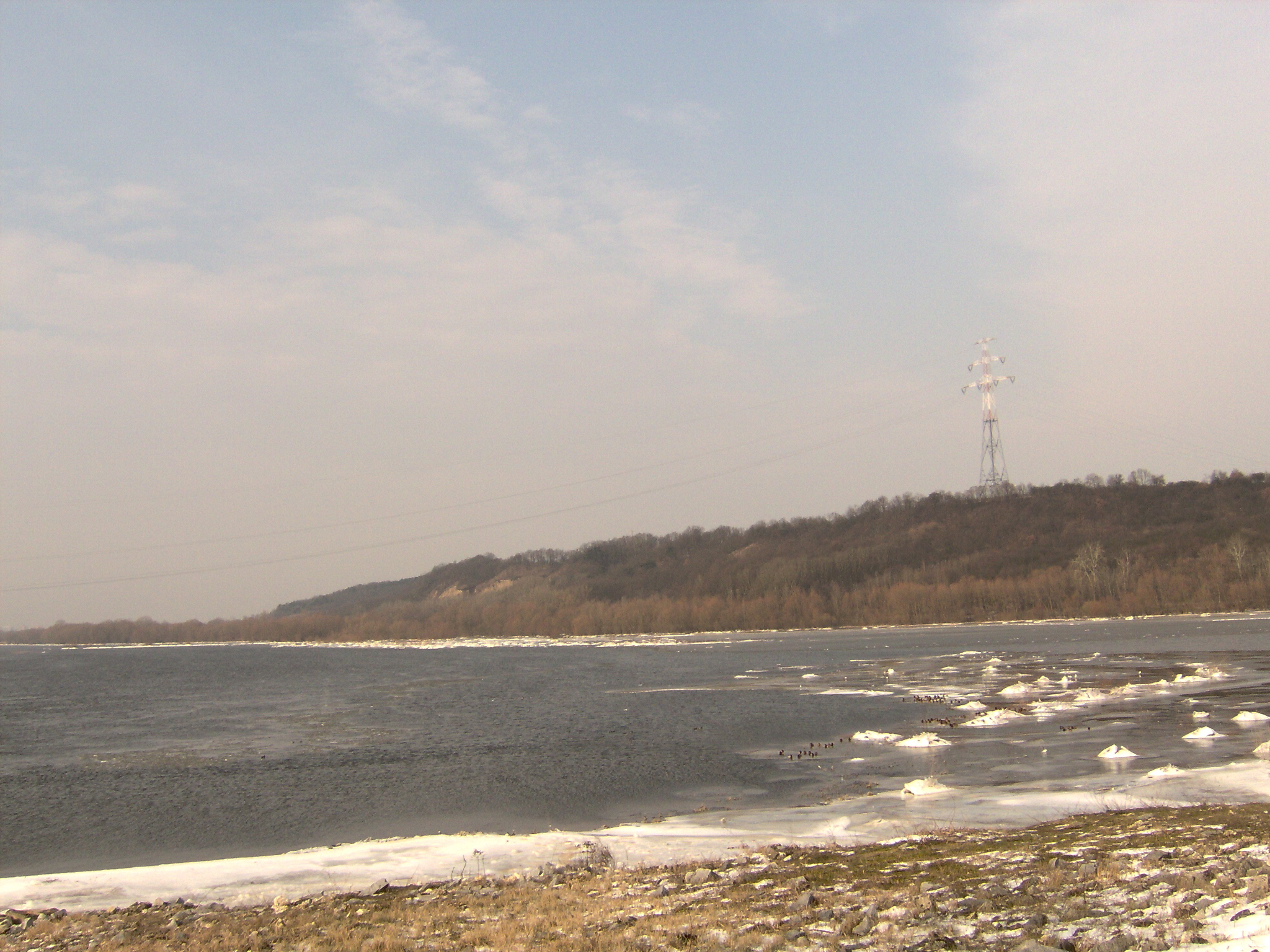 Zapora wodna na Wiśle i okolice (2007 r.)